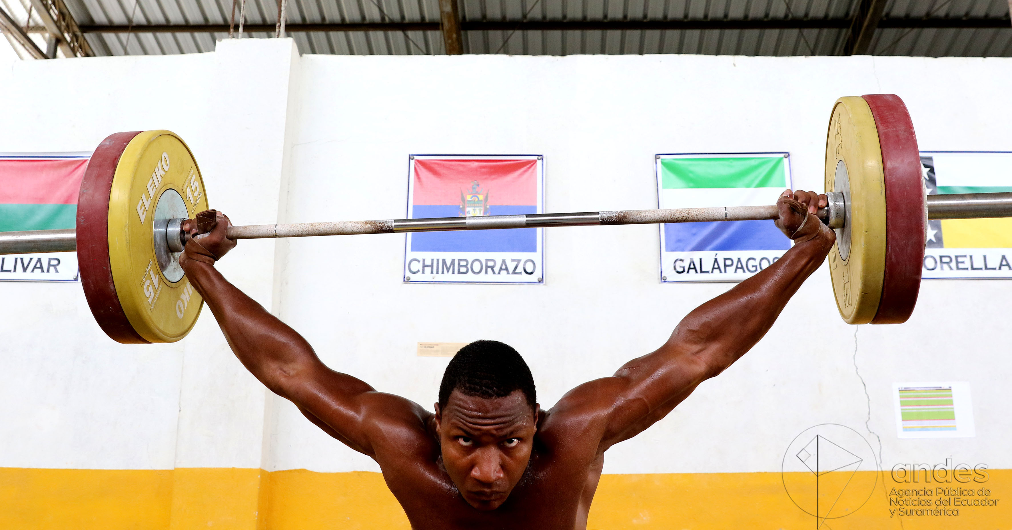 Guayaquil, miércoles 30 de marzo del 2016 (Andes).-El pesista ecuatoriano Jorge David Arroyo se prepara para participar en el preolimpico que se desarrollará en Colombia Foto:Andes/César Muñoz